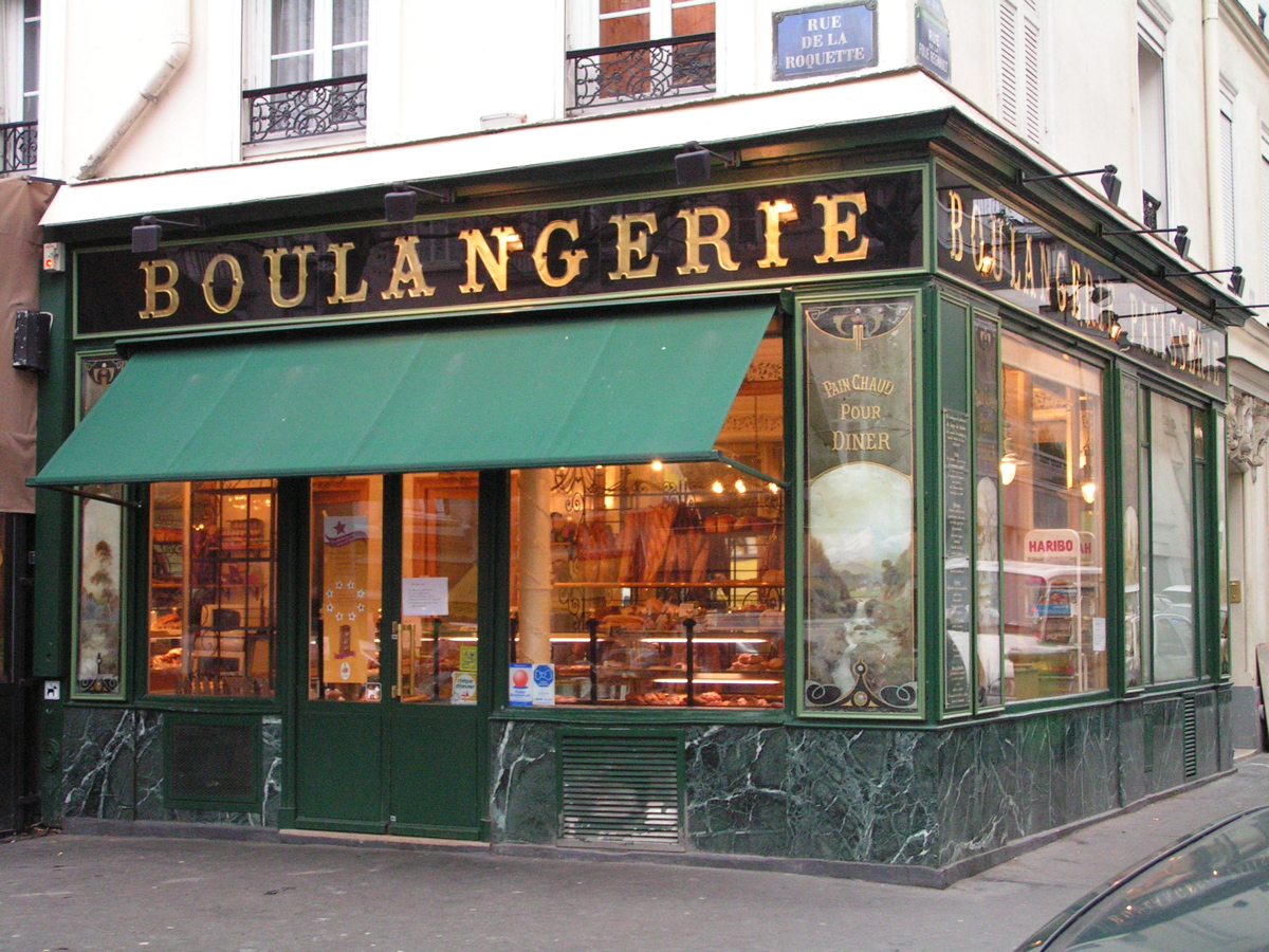 Devanture de boulangerie en Verre églomisé rue de la Roquette à Paris.